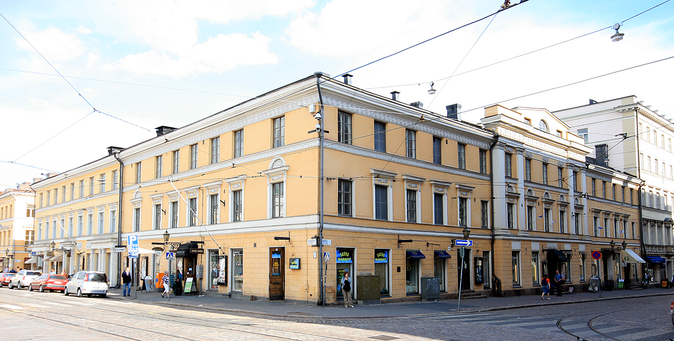 Kiseleffin talo, Aleksanterinkatu 28 / Unioninkatu 27, Helsinki.